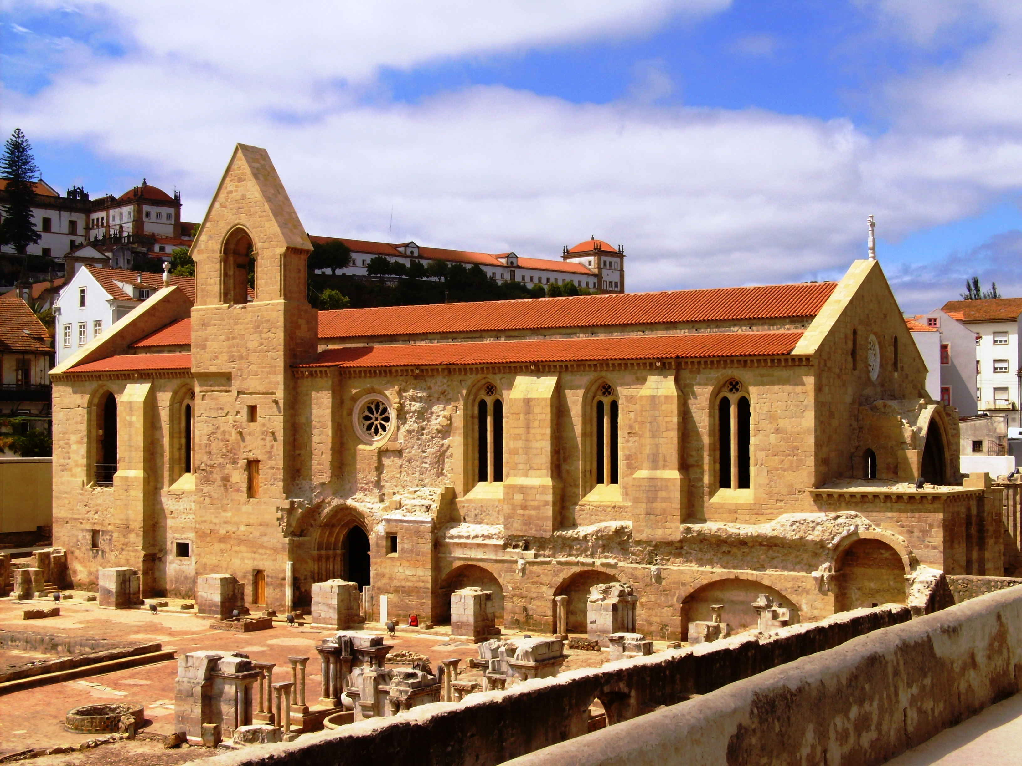 Mosteiro de Santa Clara-a-Velha, Coimbra, Distrito de Coimbra, Portugal: antiga igreja.